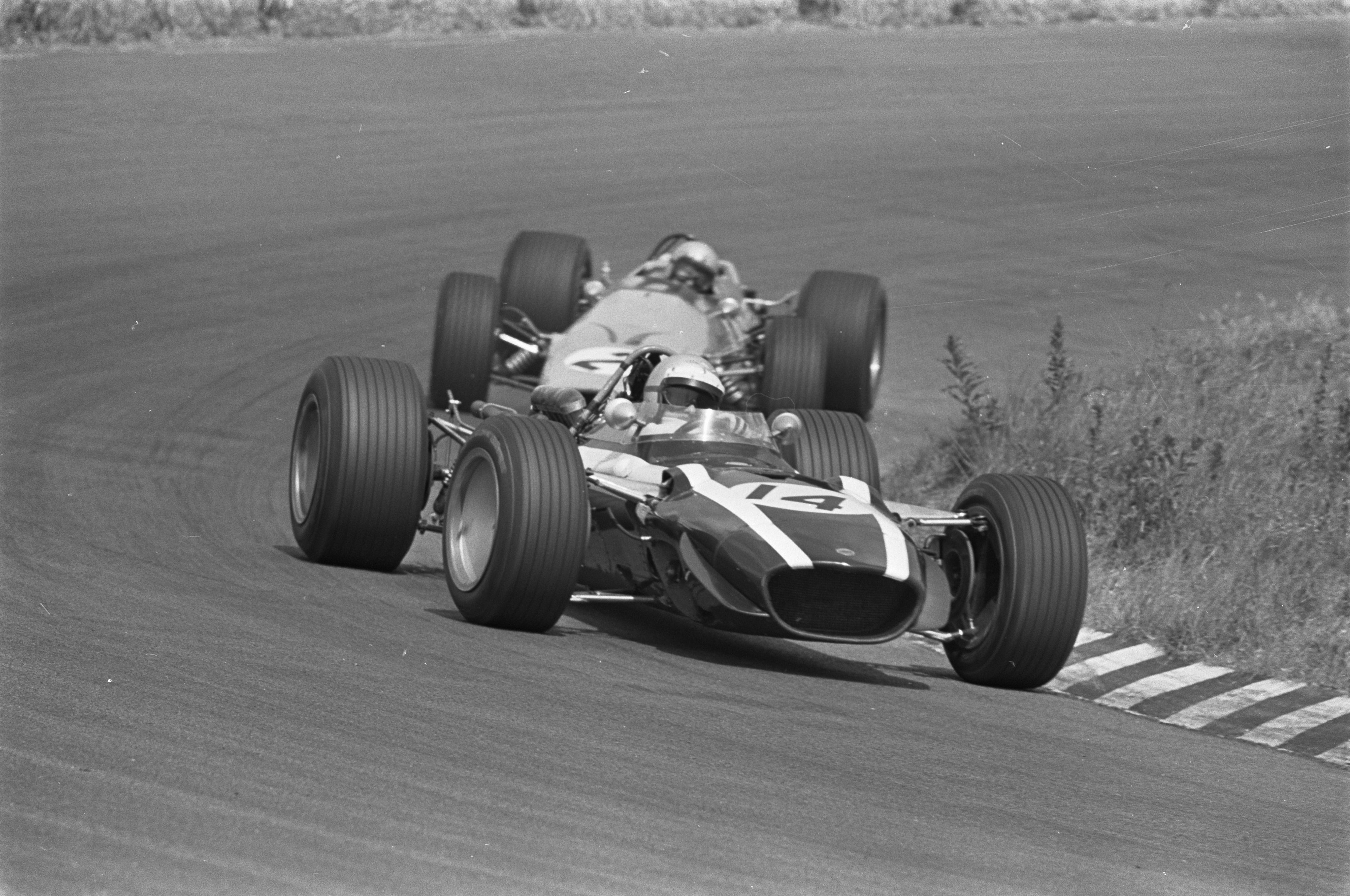 Grand Prix 68 Zandvoort . Nummer 10 John Surtees , nummer 11 Lucien Bianchi , nummer 12 Jackie Ickx /.